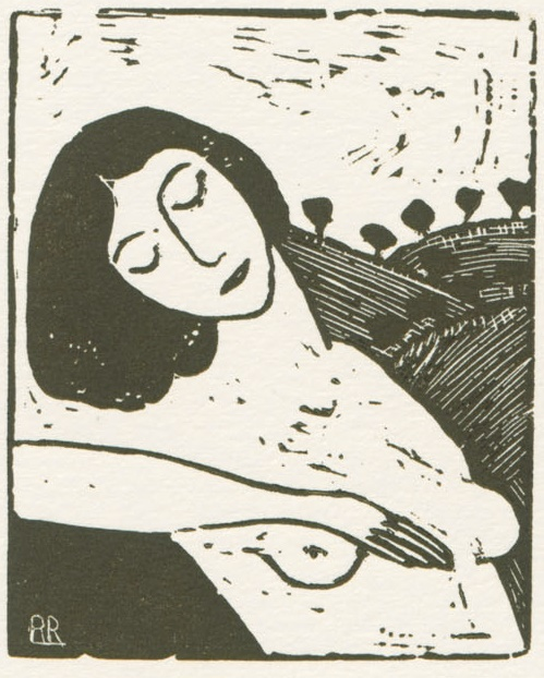 Xilografía. Biblioteca de Catalunya